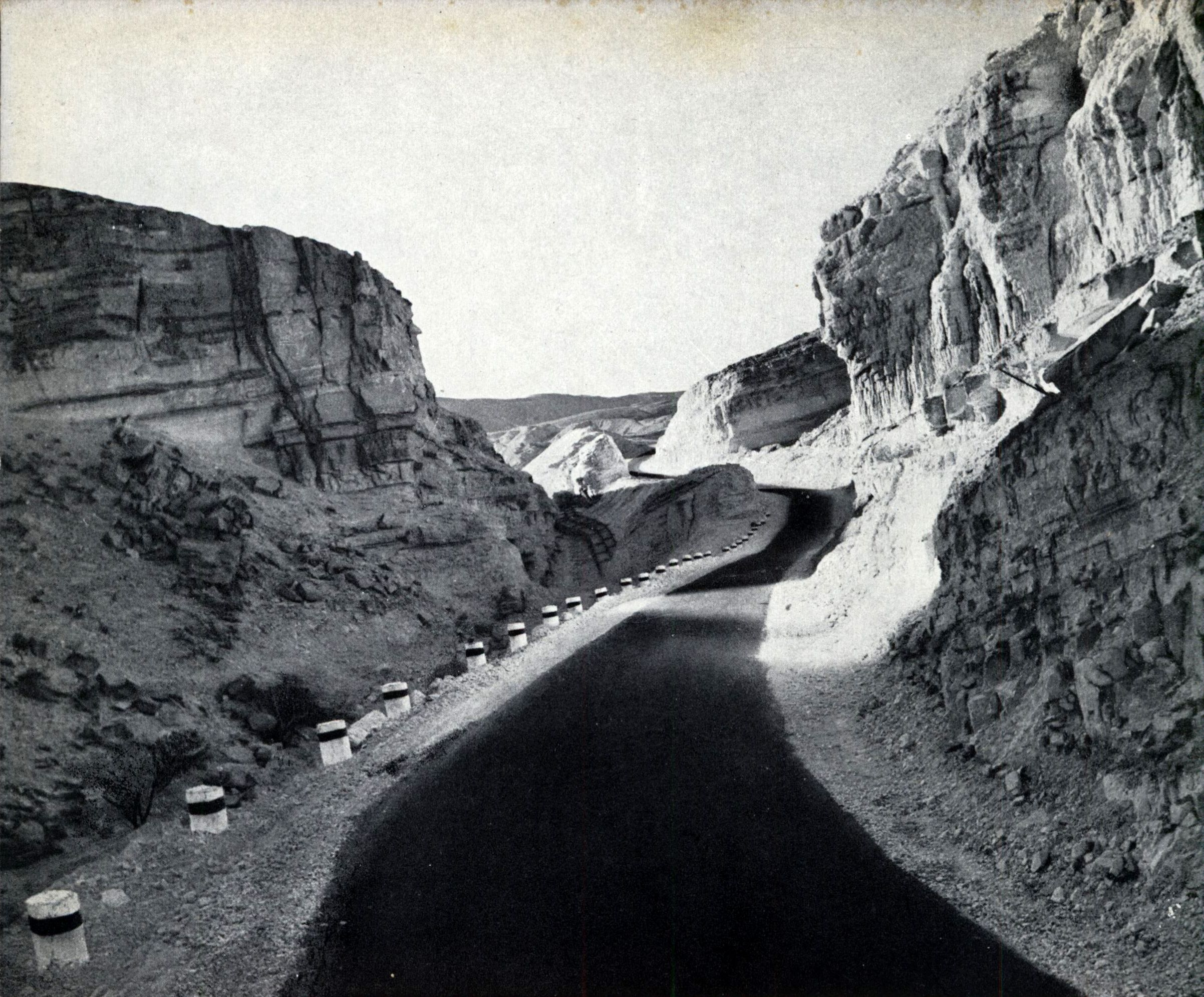 ירידה בכביש המרכזי לאילת לאורך נחל גרופית. נפרץ ע"י מ.ע.צ. בשנת 1957